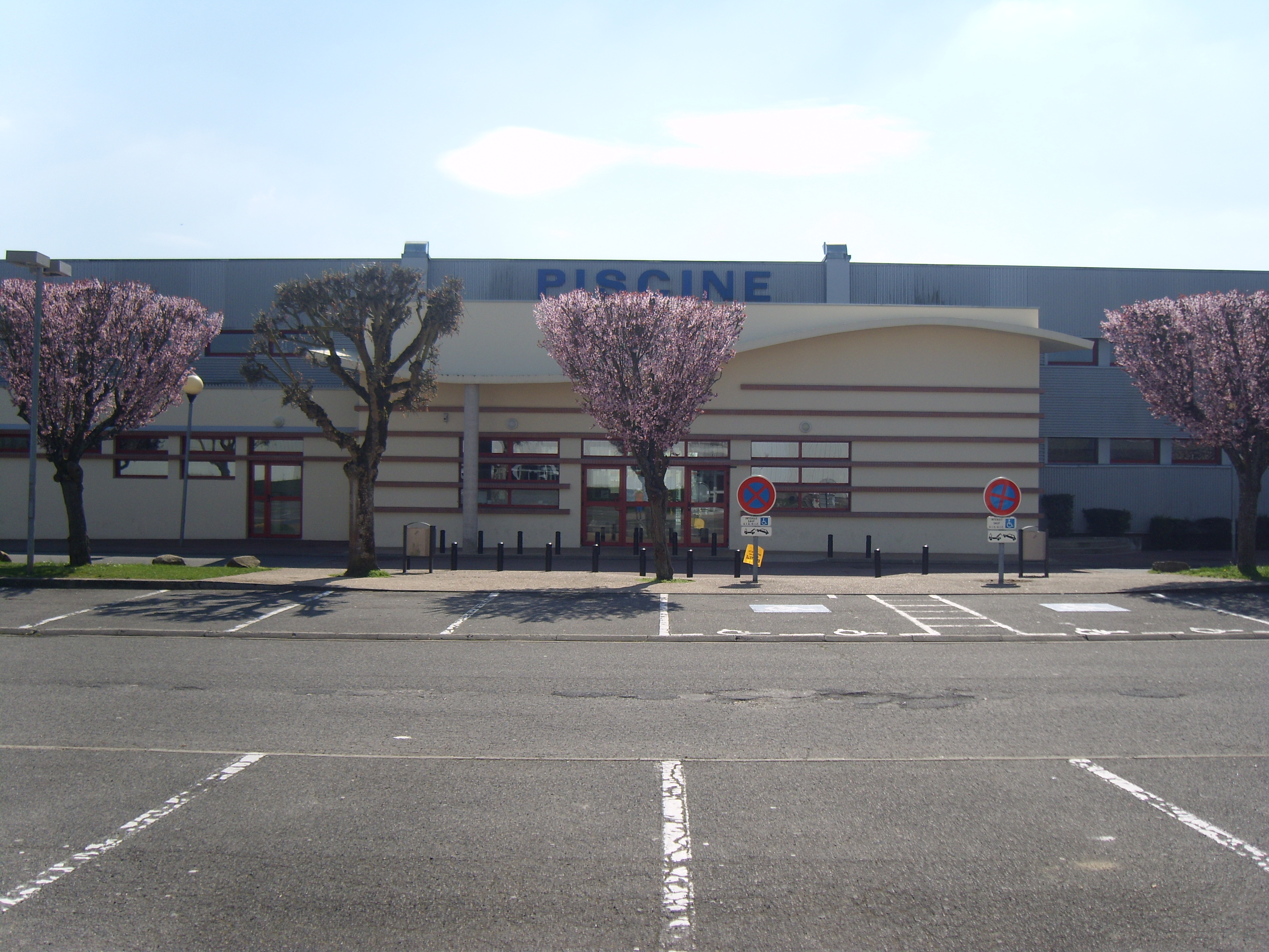 Piscine de Fontenay-Trésigny